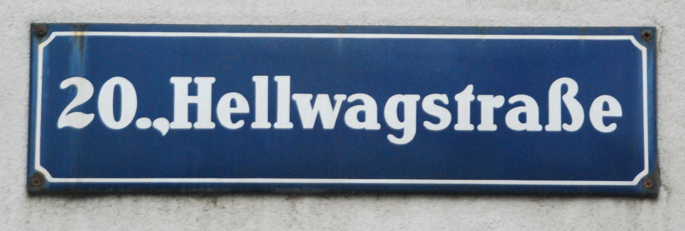 Straßentafel der nach Wilhelm Hellwag benannten Hellwagstraße in Wien-Brigittenau.